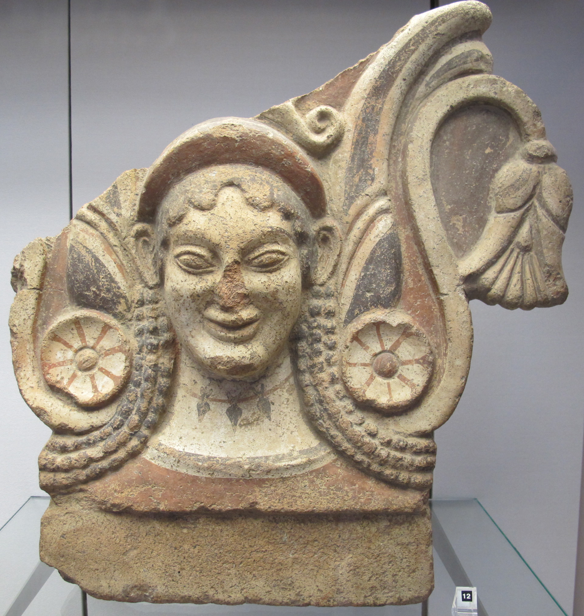 Campania, antefissa con una menade, fine VI sec ac.